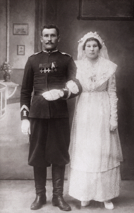 Свадебная одежда казаков.